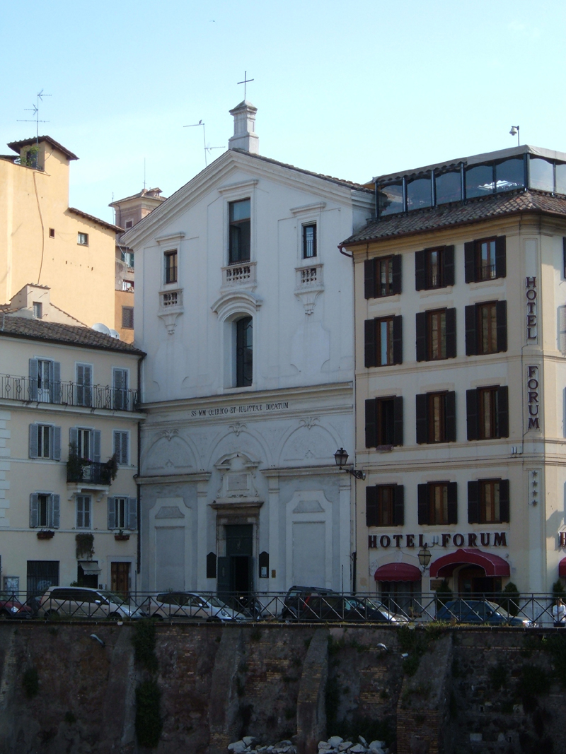 Chiesa dei Santi Quirico e Giulitta, a Roma, nel rione Monti. Foto personale.